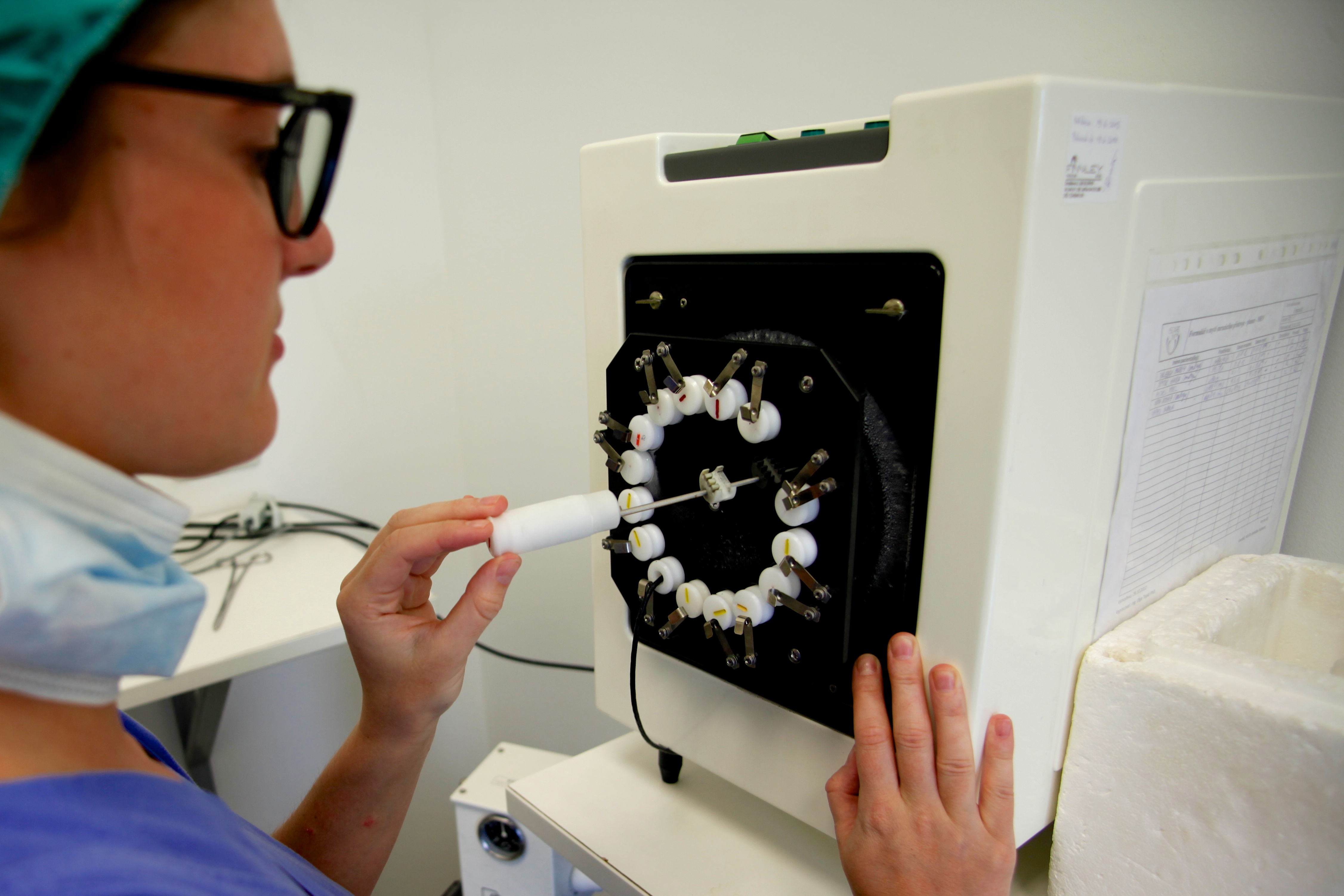 ilustrační foto ISCARE